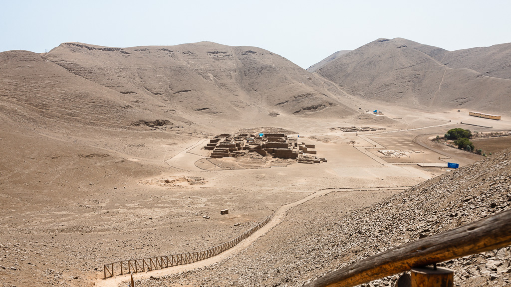 Huaca Paraíso desde el mirador